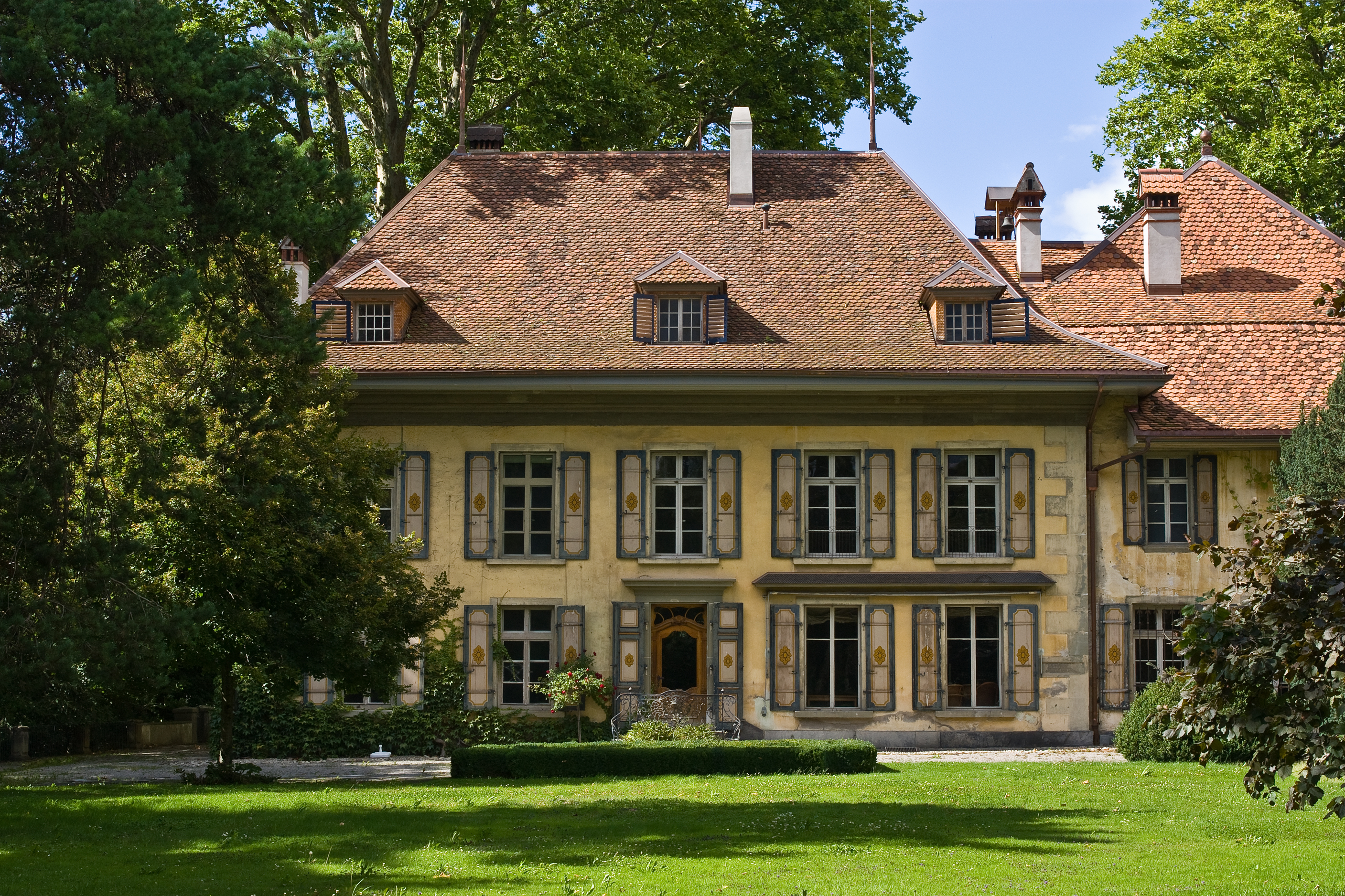 Schloss Kiesen von der Rückseite (in unrenoviertem Zustand)